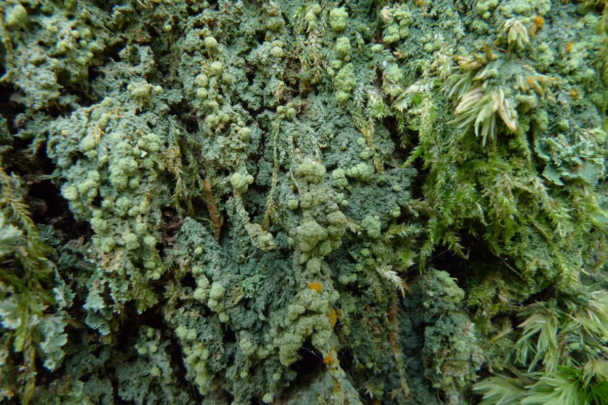 Trapeliopsis pseudogranulosa,Pont Neuf (Plouay, Morbihan, Bretagne, France)